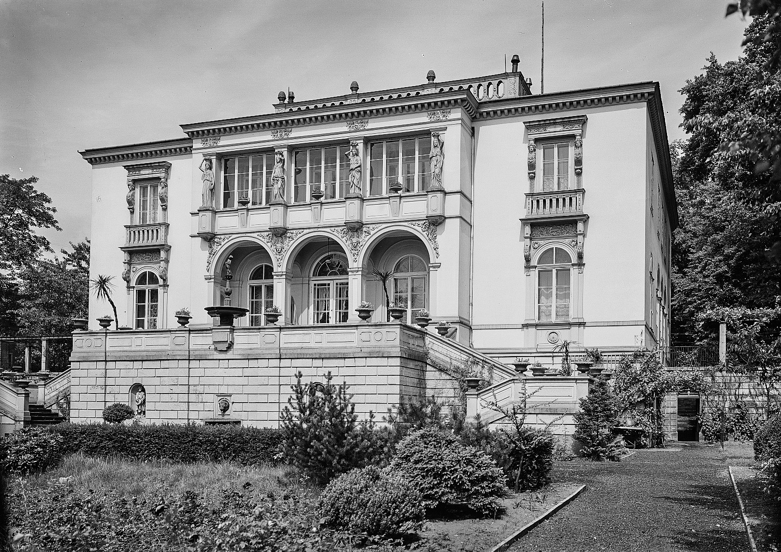 Villa Rosa, Ansicht Vorderfront, Holzhofgasse 20, Historisches Foto, Datierung 1838-1839